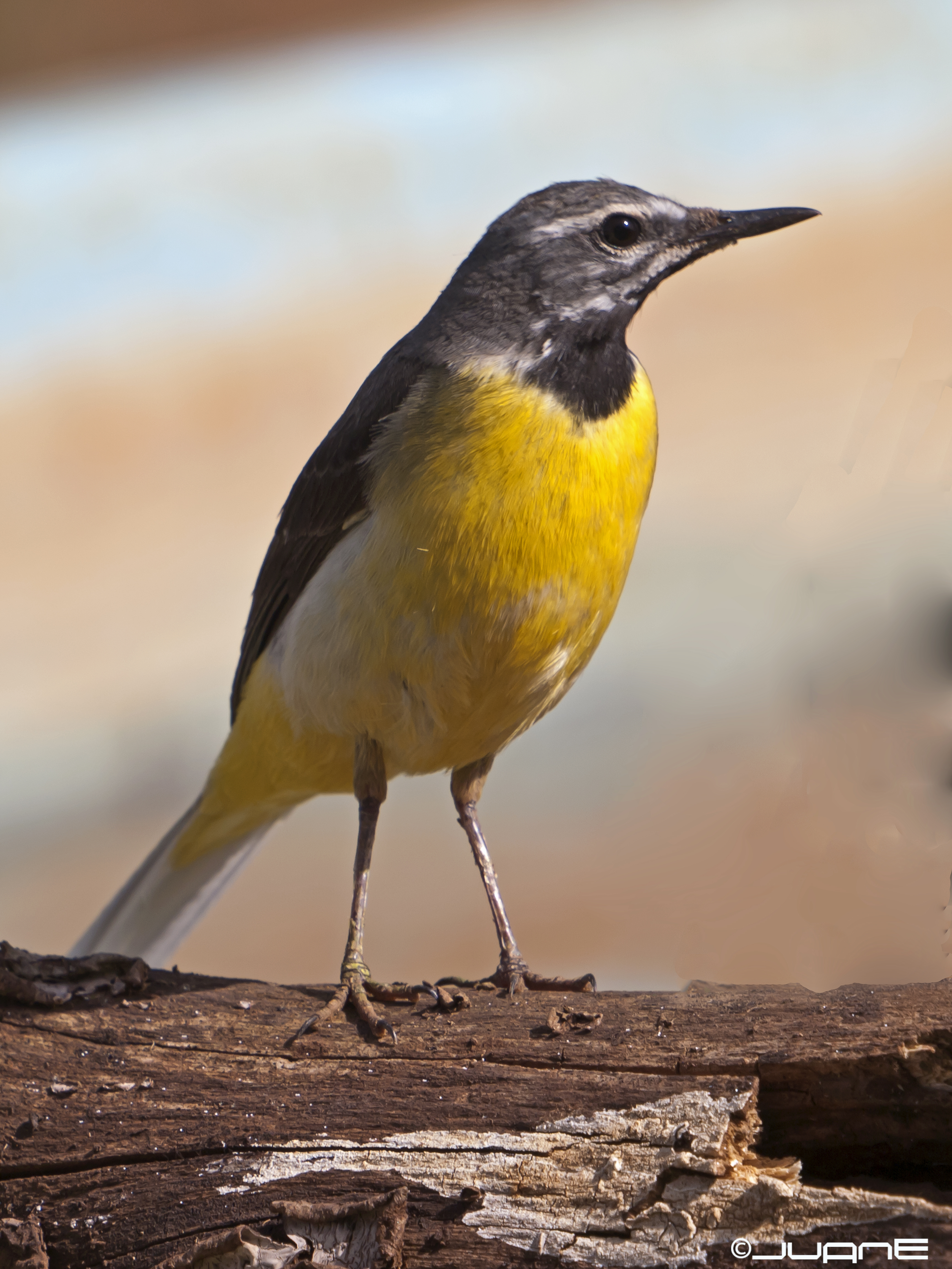 ALPISPA O LAVANDERA CASCADEÑA, Subespecie Canaria (Motacilla cinerea canariensis), Nombre científico:Motacilla cinerea canariensis(Tunstall,1771) Nombre común: Alpispa,lavandera Tamaño:sobre 18 cms. Hábitat:Todas las Islas Canarias,excepto Lanzarote y Fuerteventura Nivel de protección:en el catálogo de especies amenazadas Coloración:Parte superior grisácea,constrastando con la parte baja amarilla.Larga cola oscura. Dimorfismo sexual:El macho en el periodo reproductivo tiene la garganta de color negro. Comportamiento:Muy vivaz,siempre en movimiento,cerca de aguas superficiales.Llamativo el movimiento contínuo de su cola